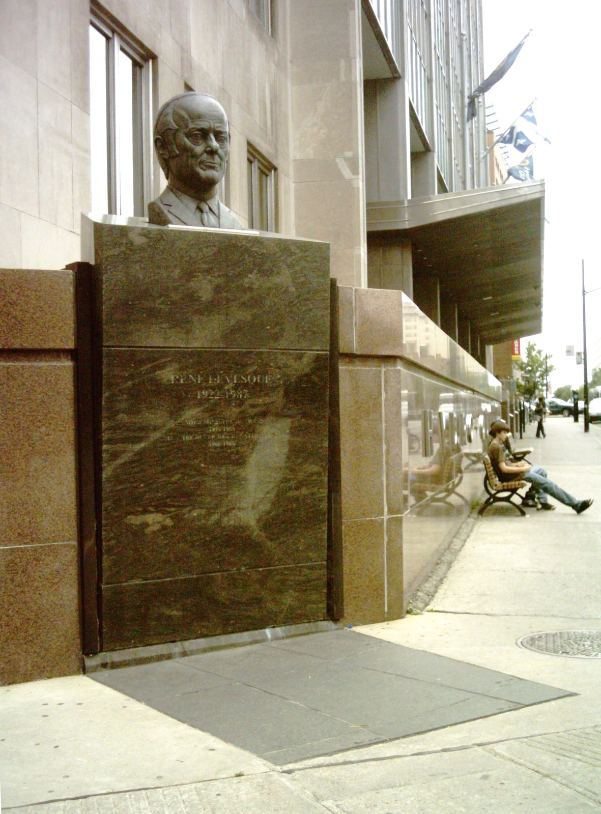 Monument à René Lévesque intégré à l'édifice d'Hydro-Québec au coin du boulevard René-Lévesque et de la rue Saint-Urbain à Montréal. On peut y lire : « René Lévesque, 1922-1987, Premier-ministre du Québec, 1976-1985, Ministre des richesses naturelles, 1960-1966 ».